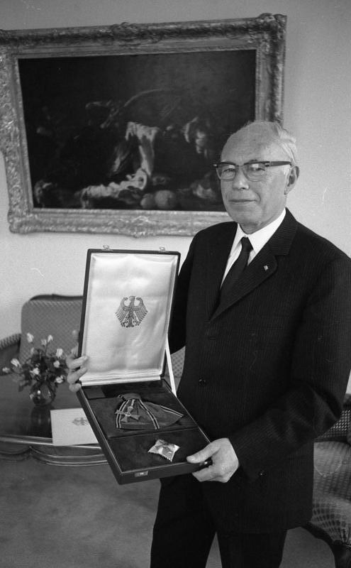 Staatssekretär Mercker mit dem Großen Bundesverdienstkreuz